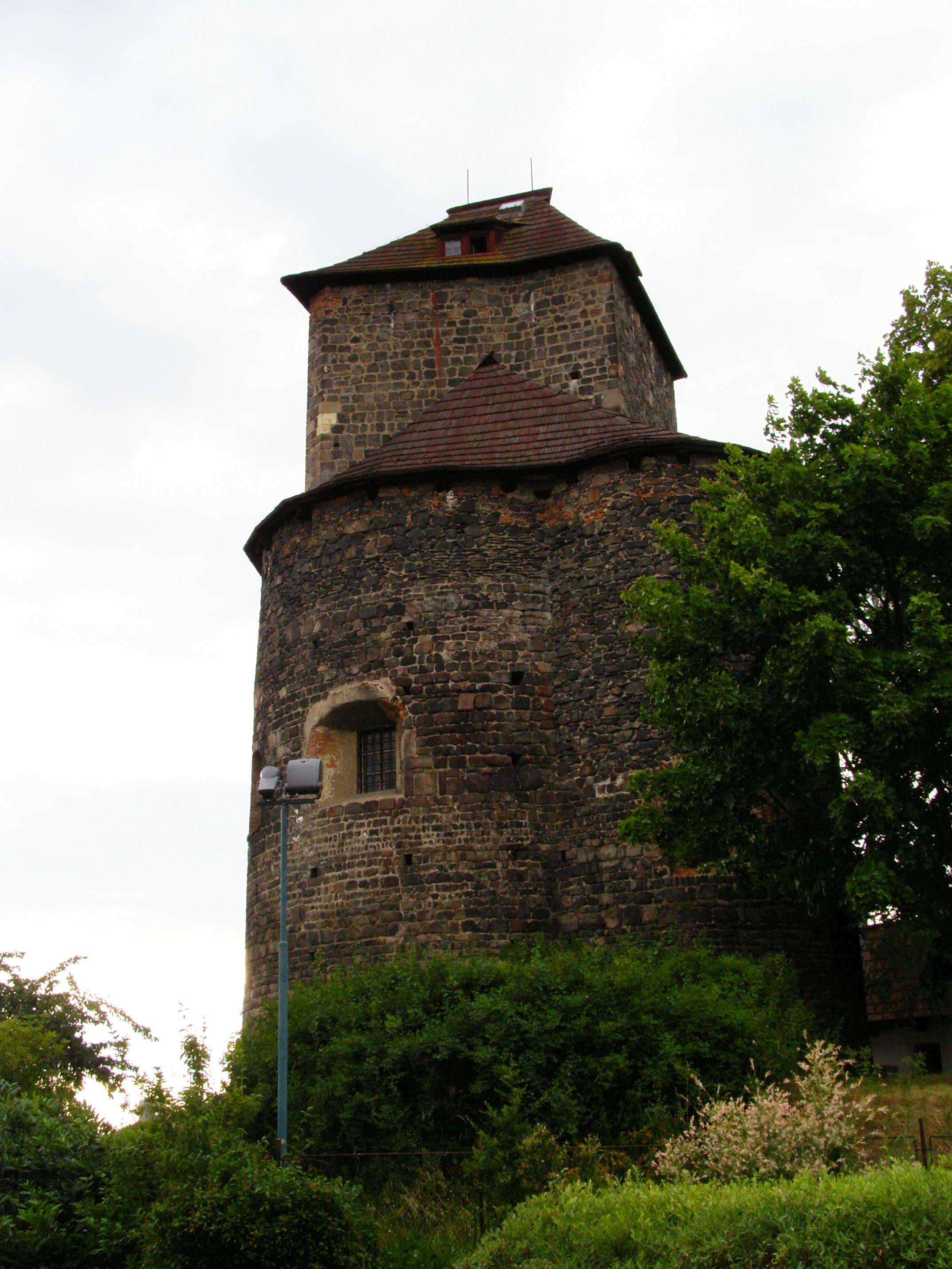 Týnec nad Sázavou, románský hrad s přilehlou rotundou